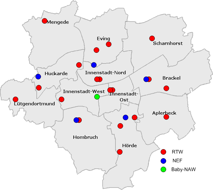 Karte Dortmunds mit Bezeichnung der Stadtteile und Darstellung der Standorte von RTW, NEF und Baby-NAW